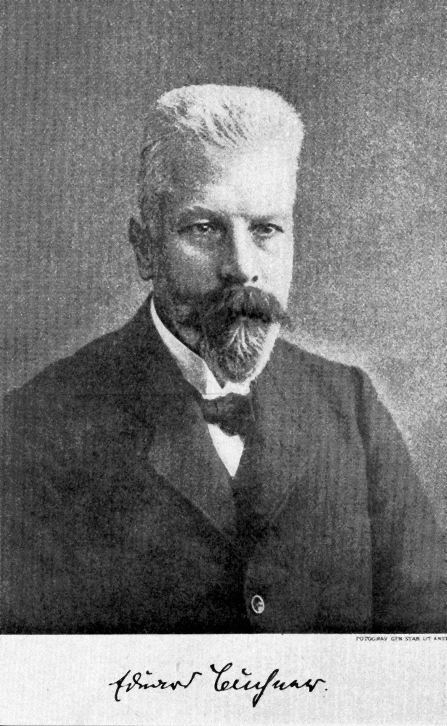 Eduard Buchner (* 20. Mai 1860 in München; † 13. August 1917 in Focșani, Rumänien)